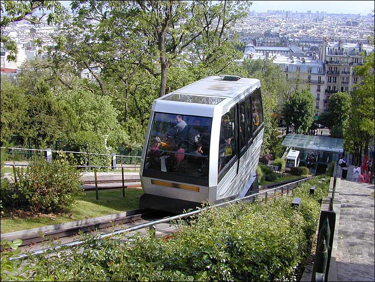 Montmartre funicular, in Paris